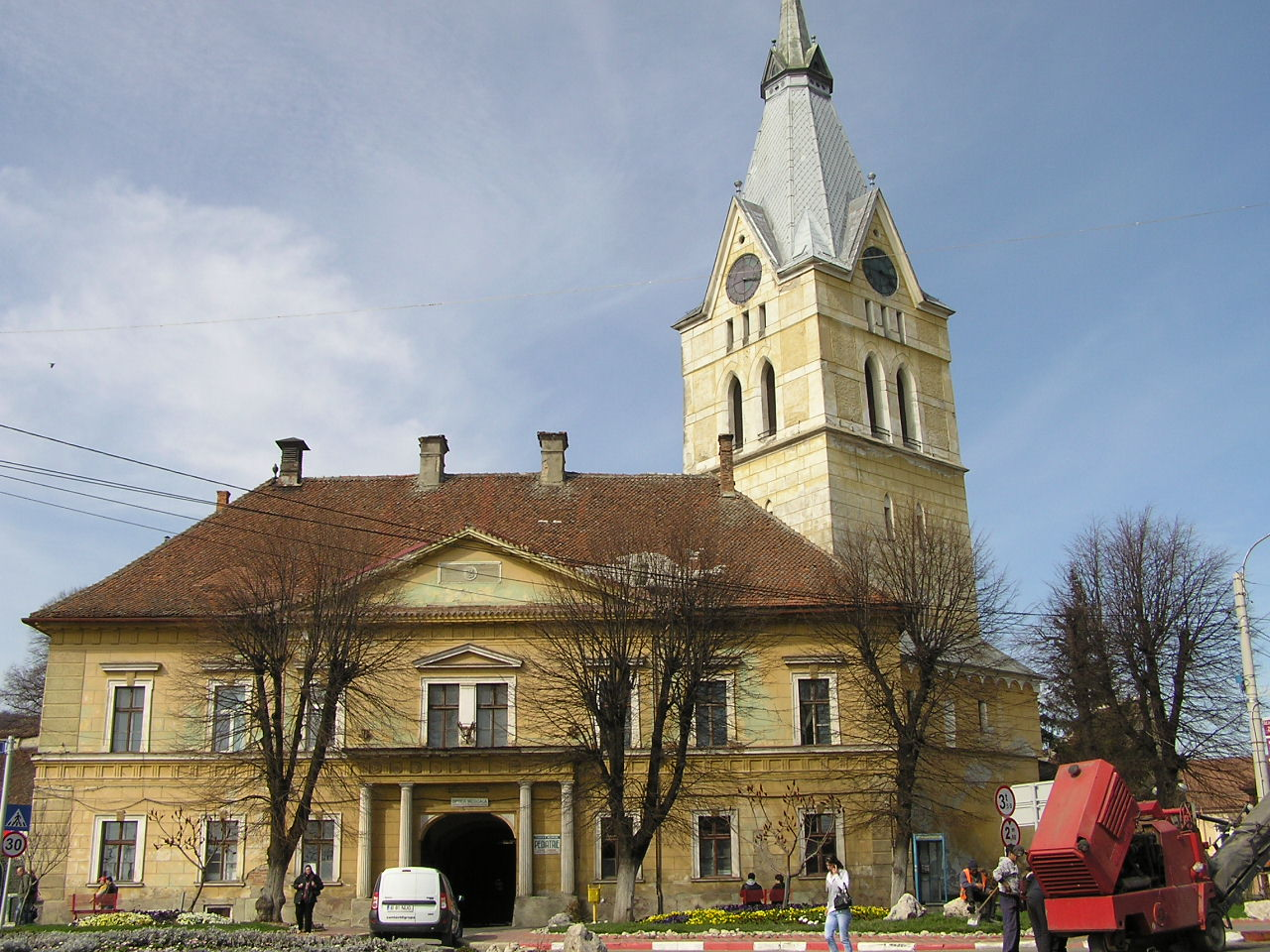 Eingang der Kirchenburg (früher altes Rathaus) von Codlea / Zeiden, Rumänien.